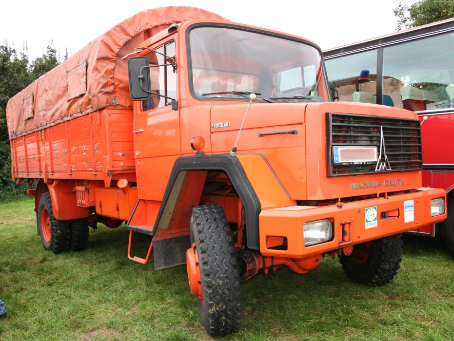 Magirus-Deutz M170D15AK, Dekontaminationsmehrzweckfahrzeug (Prototyp), aufgenommen 2007